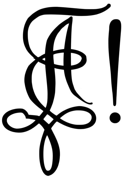 Zirkel des "Vereins deutscher Studenten Asciburgia" (Wien-Prag) zu Mainz